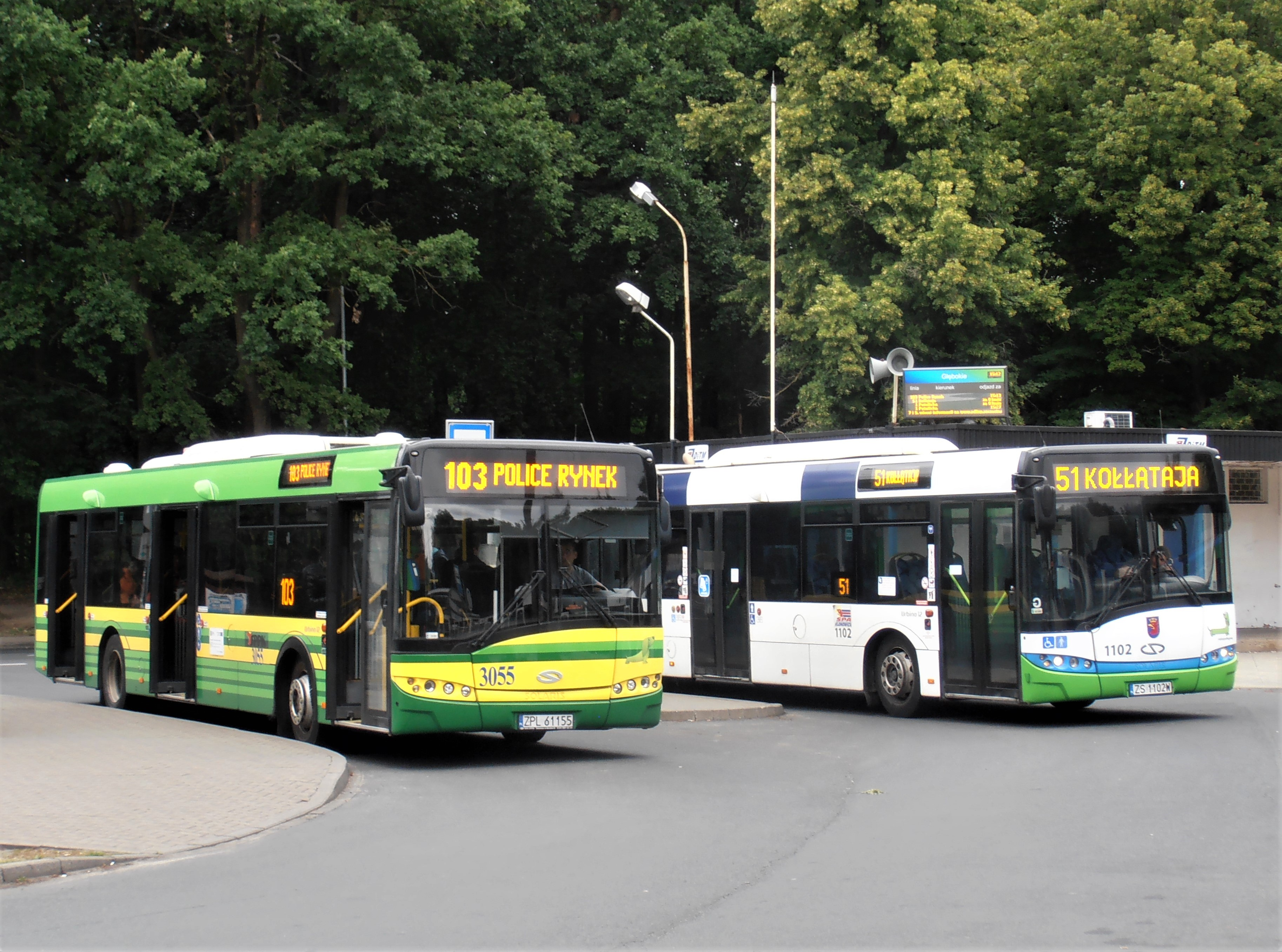 Postój autobusów Solaris Urbino 12 na pętli autobusowej Głębokie w Szczecinie, 2019